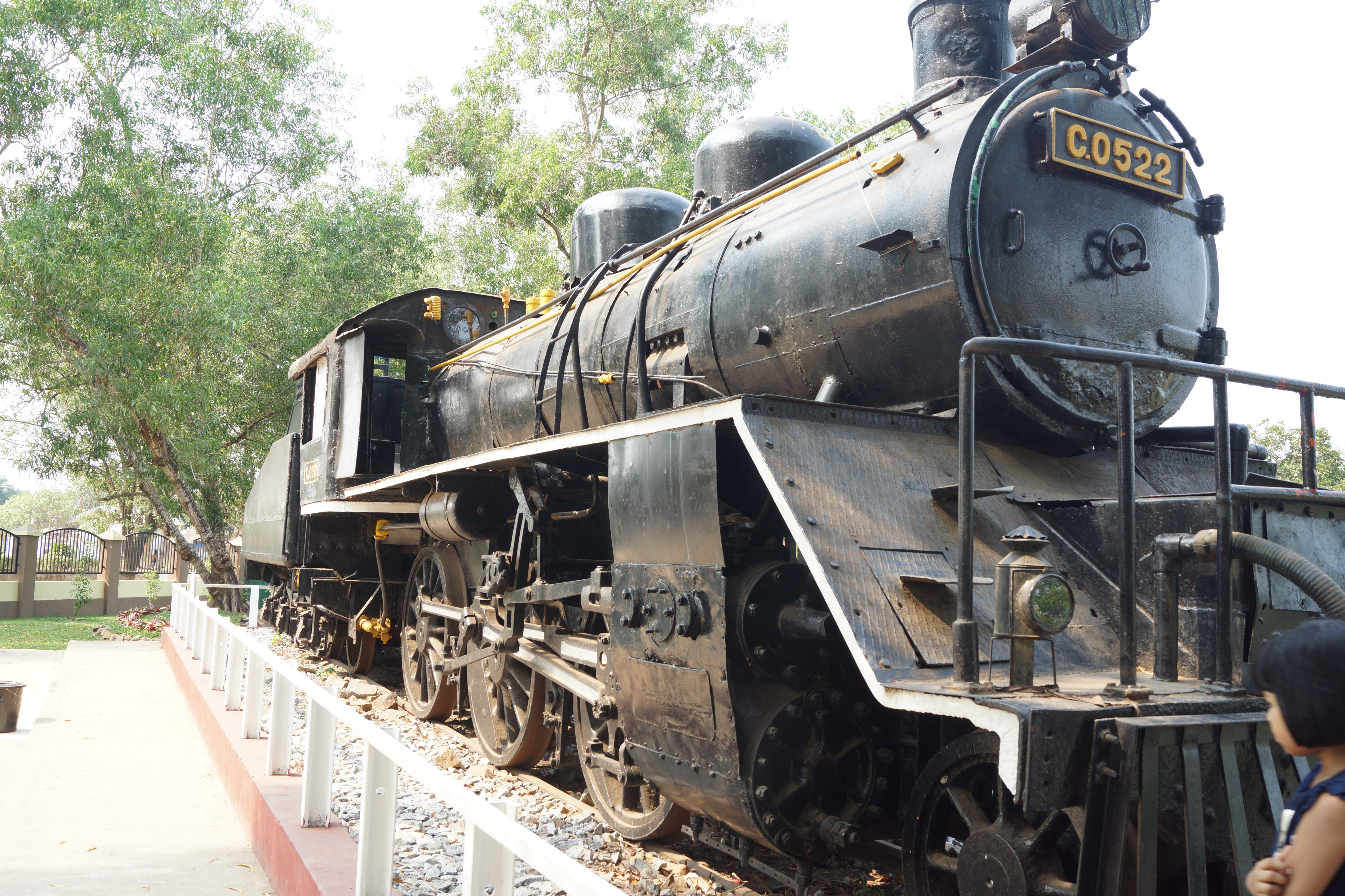 Thanbyuzayat MMR011004701, Myanmar (Burma)